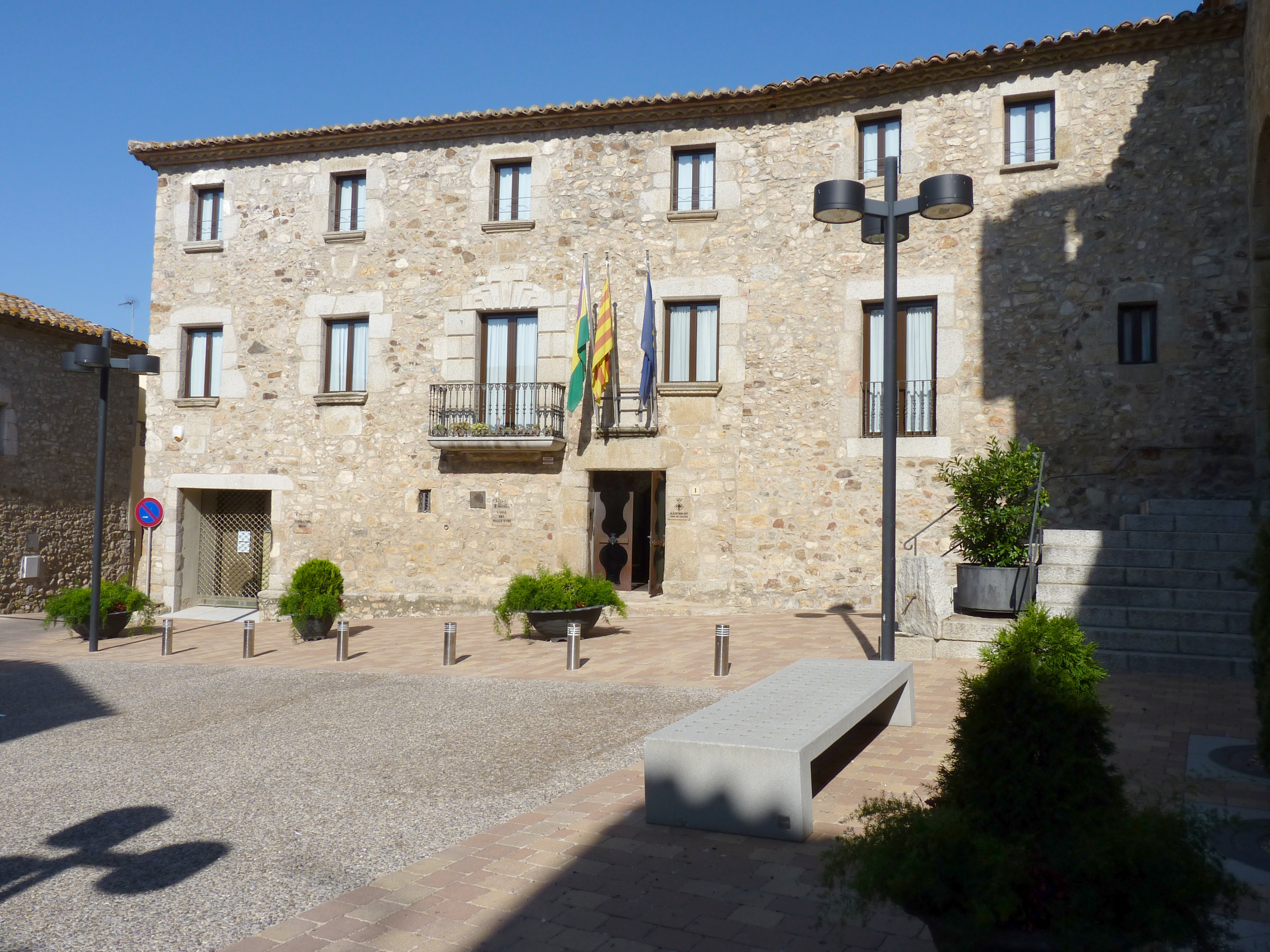 Hôtel de ville, Capmany (Haut-Ampurdan, Gérone, Catalogne, Espagne)